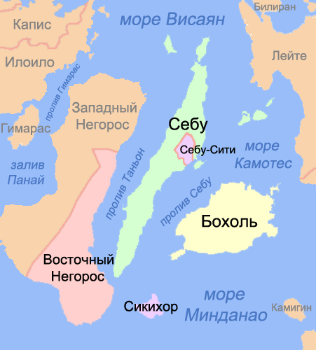 Карта провинций региона Центральные Висайи (Филиппины)